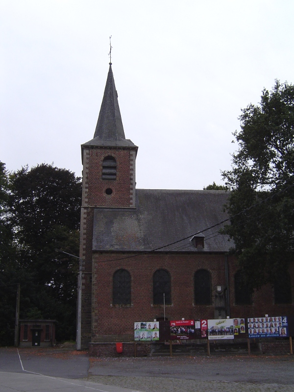 Blicquy, Église Saint-Lambert et monument aux morts en période électorale